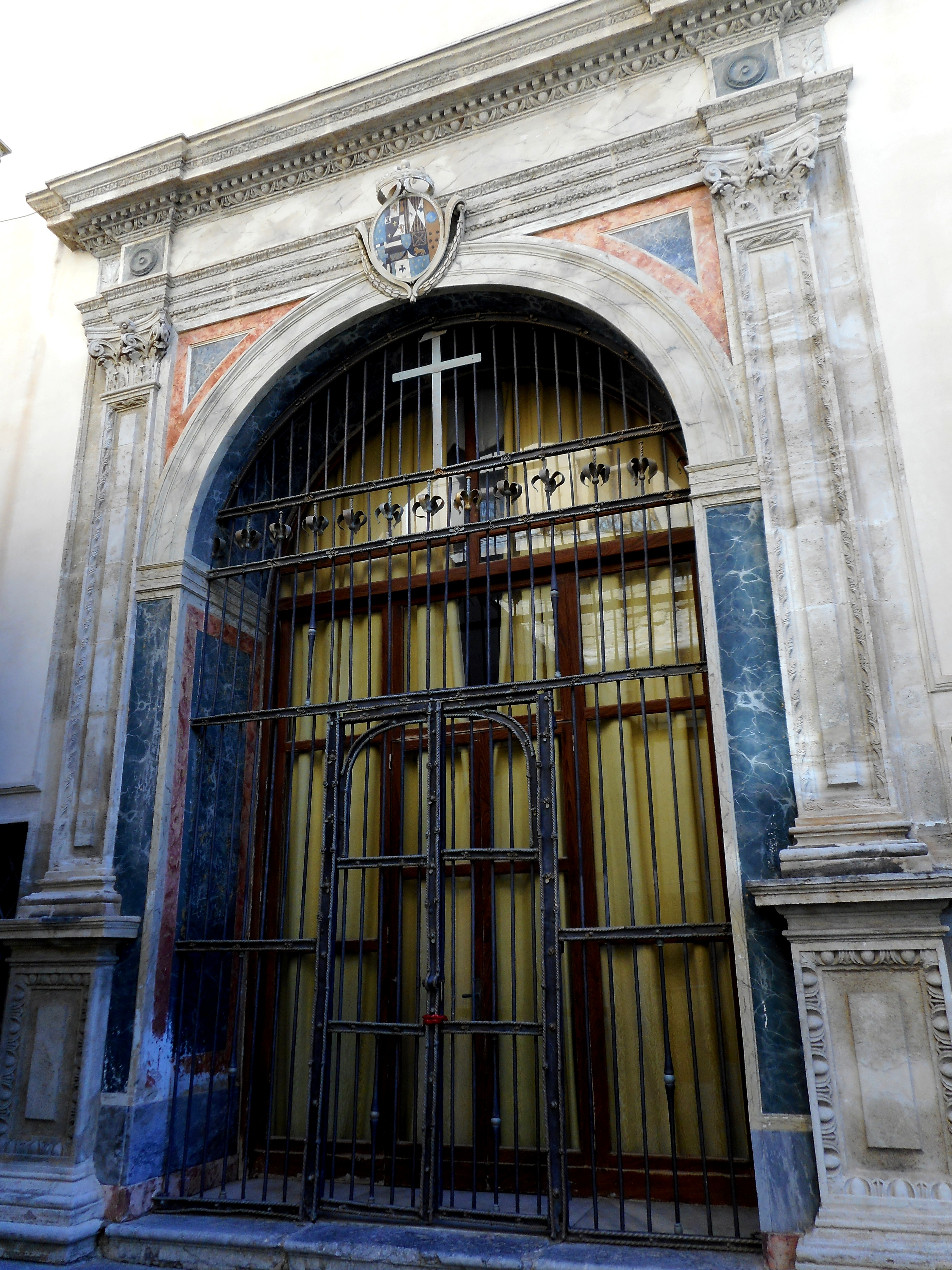 Esterno della Cappella della Soledad